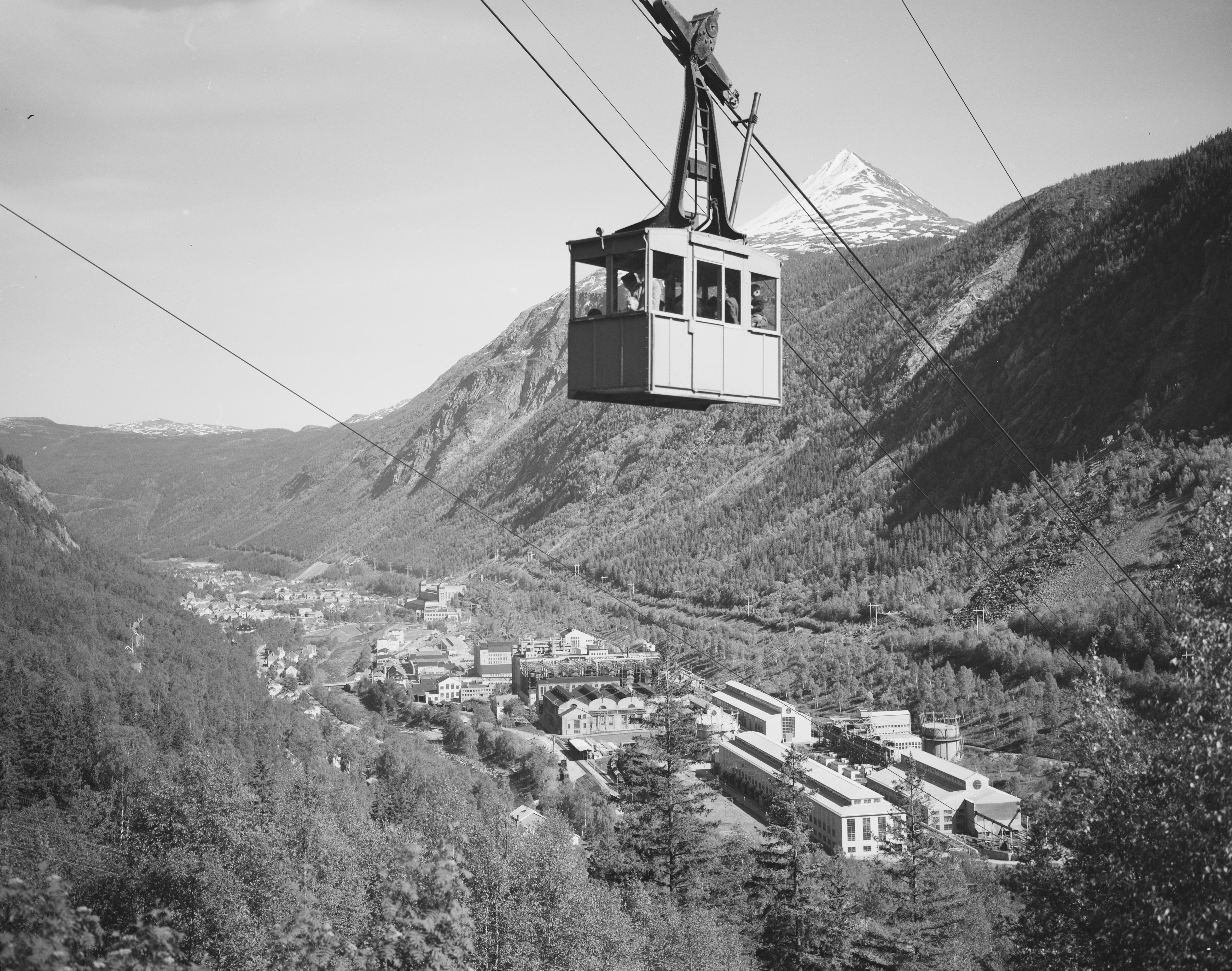 Bildet er hentet fra Nasjonalbibliotekets bildesamling. Anmerkninger til bildet var: Fotograf: ÅM Rjukan, Tinn, Telemark